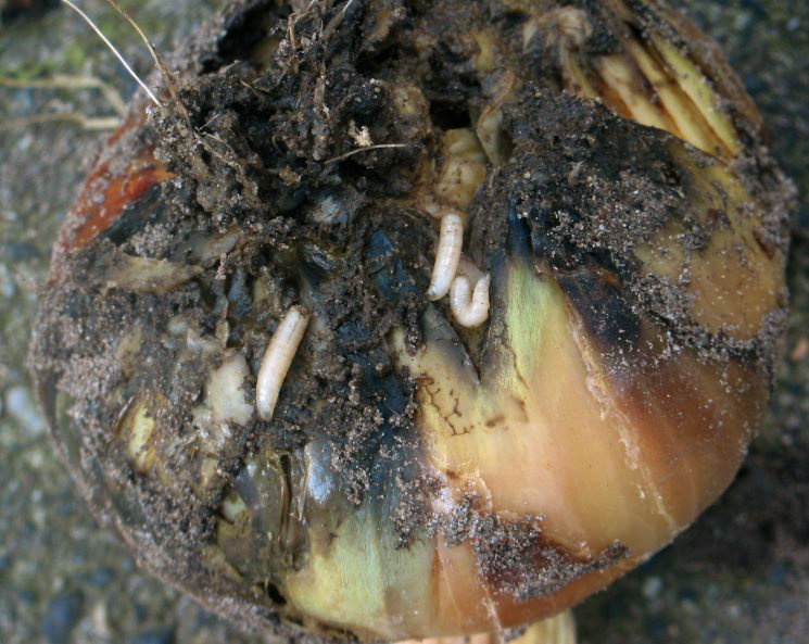 zelfgemaakte foto van maden van de uienvlieg op plantui; eind juli